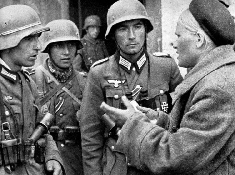 Soldati tedeschi dell'11. Armee interrogano civili in Crimea